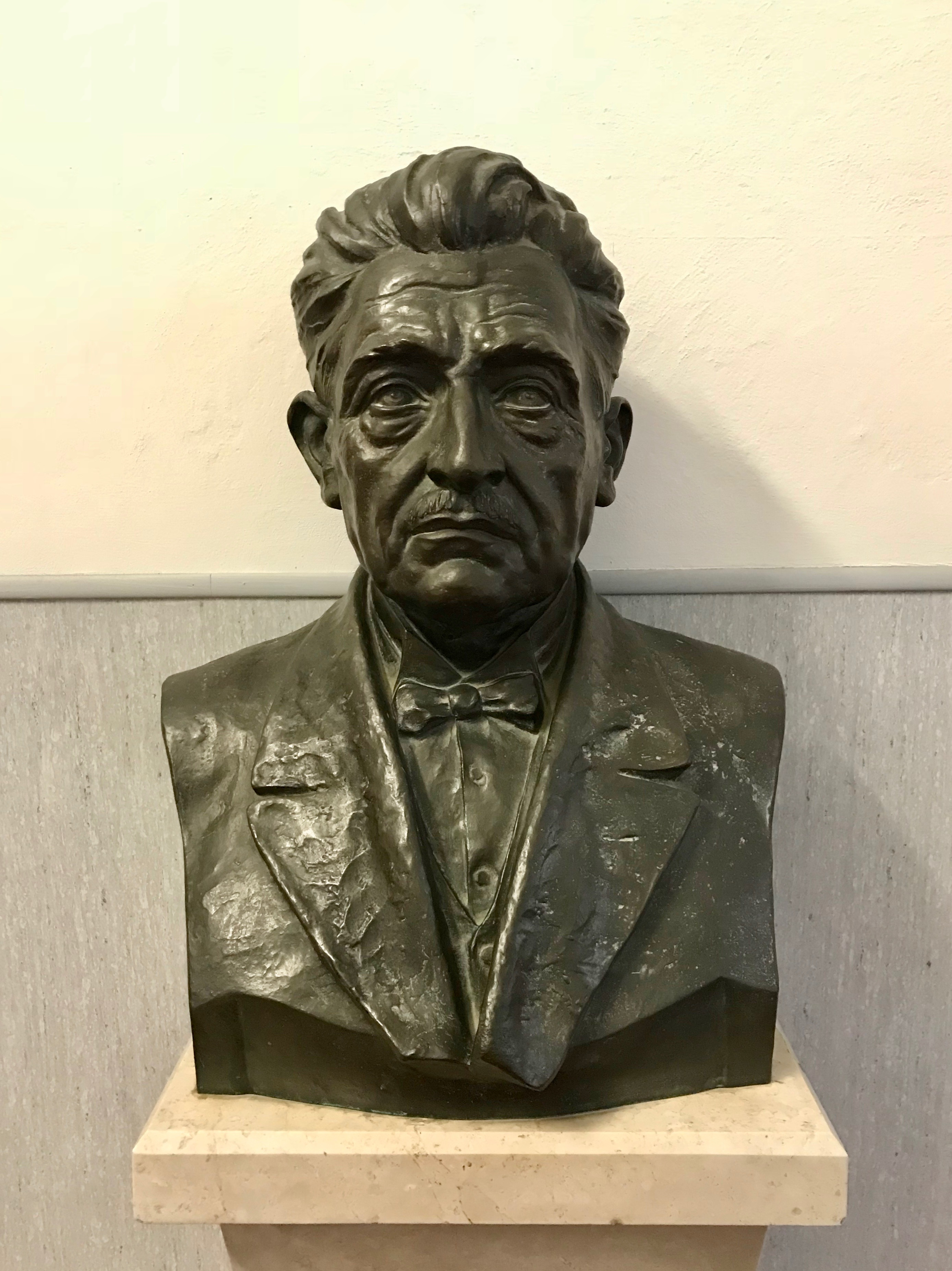 Busto dell'Igienista italiano Alfonso di Vestea che si trova all'interno della scuola di igiene dell'università di Pisa